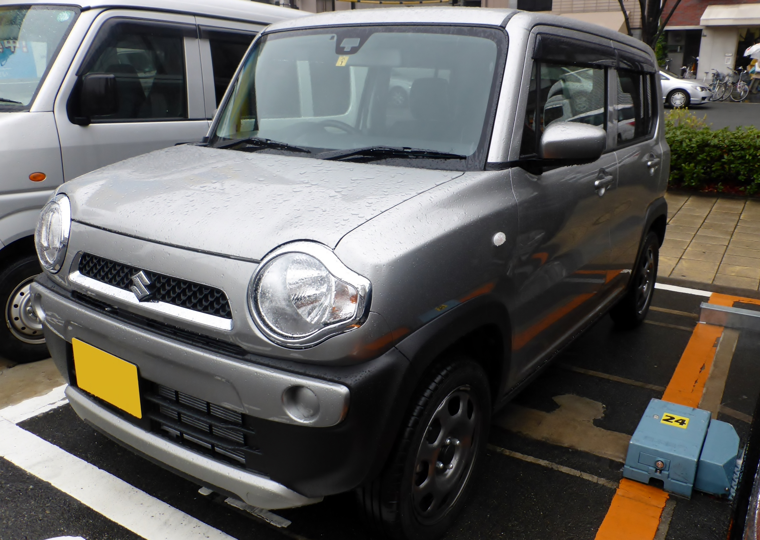 MR31S型スズキ・ハスラーGをフロントから撮影。